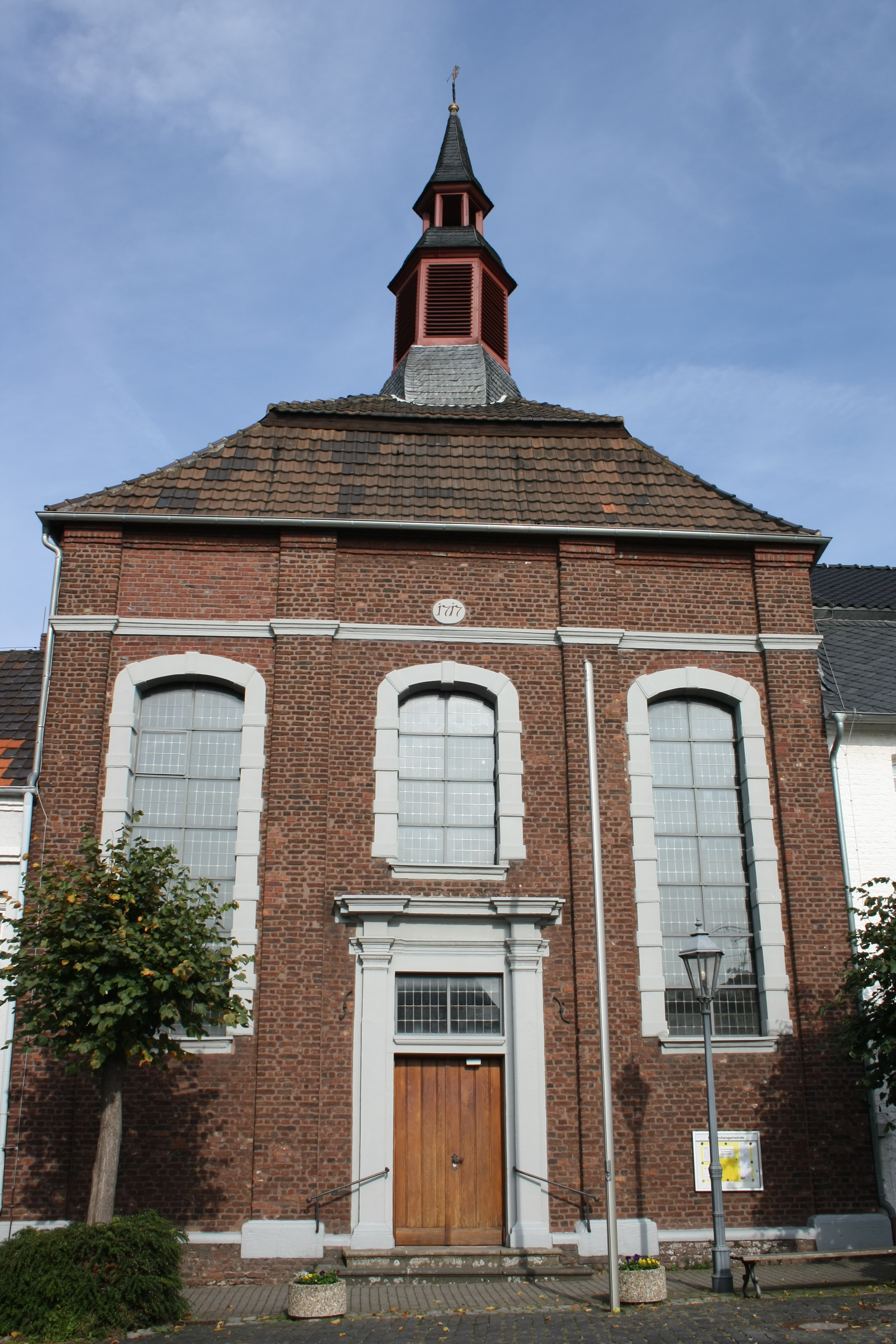 Evangelische Kirche in Linnich, Portalfassade